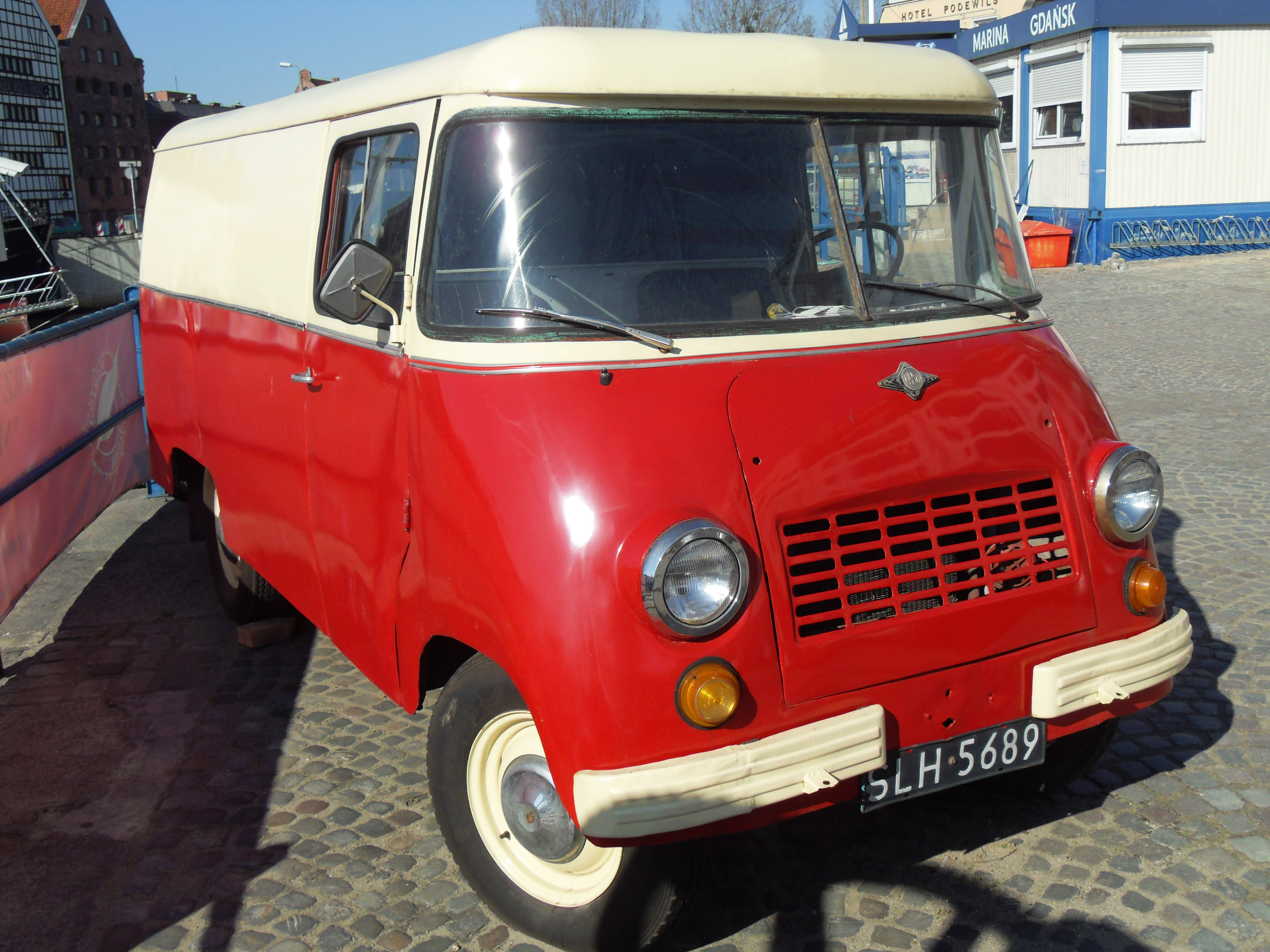 Gdańsk. Nysa nad Motławą.